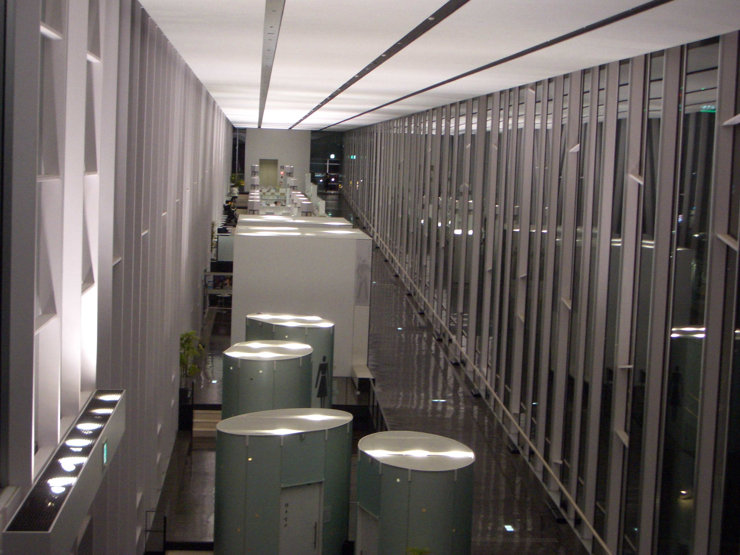 Chino Cultural Complex 茅野市民会館